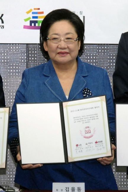 한국여자야구연맹 김을동 회장, 이한수 익산시장, lg전자 경영지원부문장 이영하 사장은 23일 오후 서울 도곡동 야구회관에서 ‘Lg배 한국여자야구대회’ 개최를 위한 Mou를 체결했다.